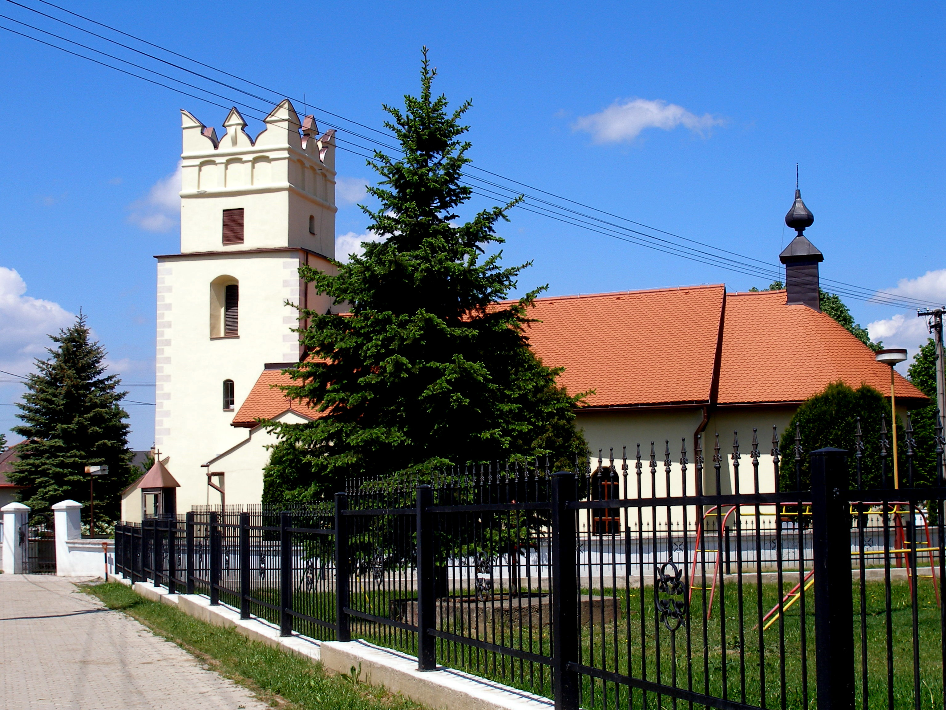 Kostol svätého Martina v obci Červenica pri Sabinove, región Šariš. This medium shows the protected monument with the number 708-276/0 in the Slovak Republic.